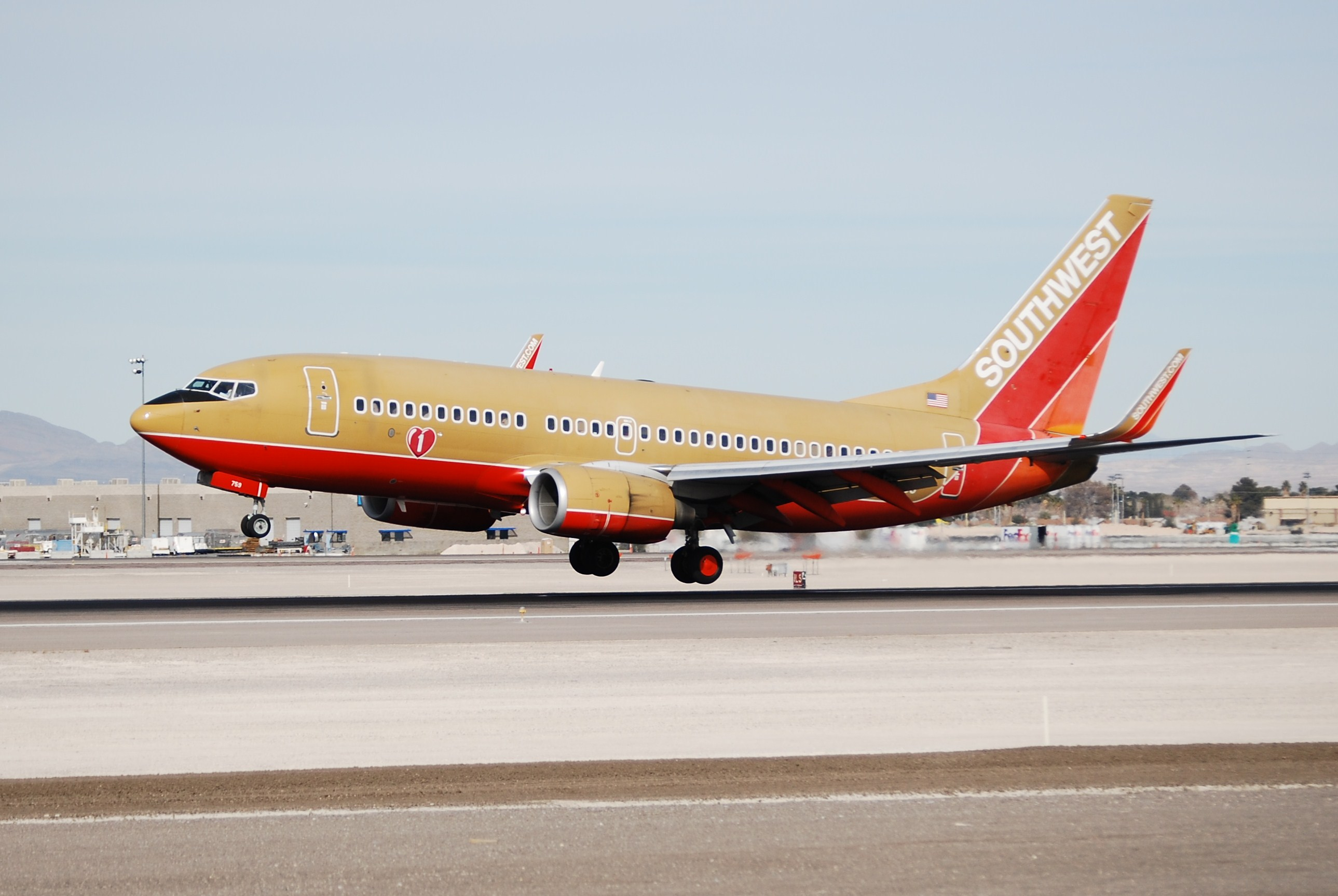 SOUTHWEST